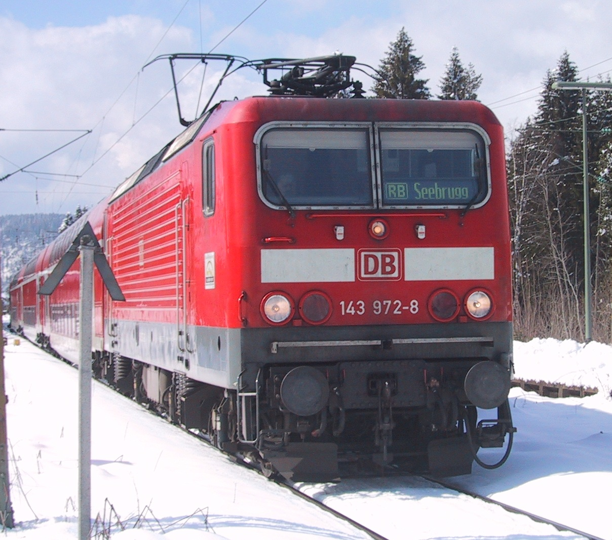 DB 143 972 mit Doppelstockzug auf der Höllentalbahn im Schwarzwald bei Ausfahrt aus dem Bahnhof Hinterzarten, im Schnee